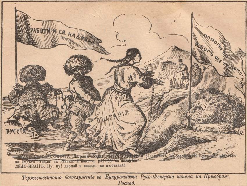 „Търѫествено богослужение”, печ. въ „Тѫпанъ” год. I, бр. 9, (10. VIII. 1869.)